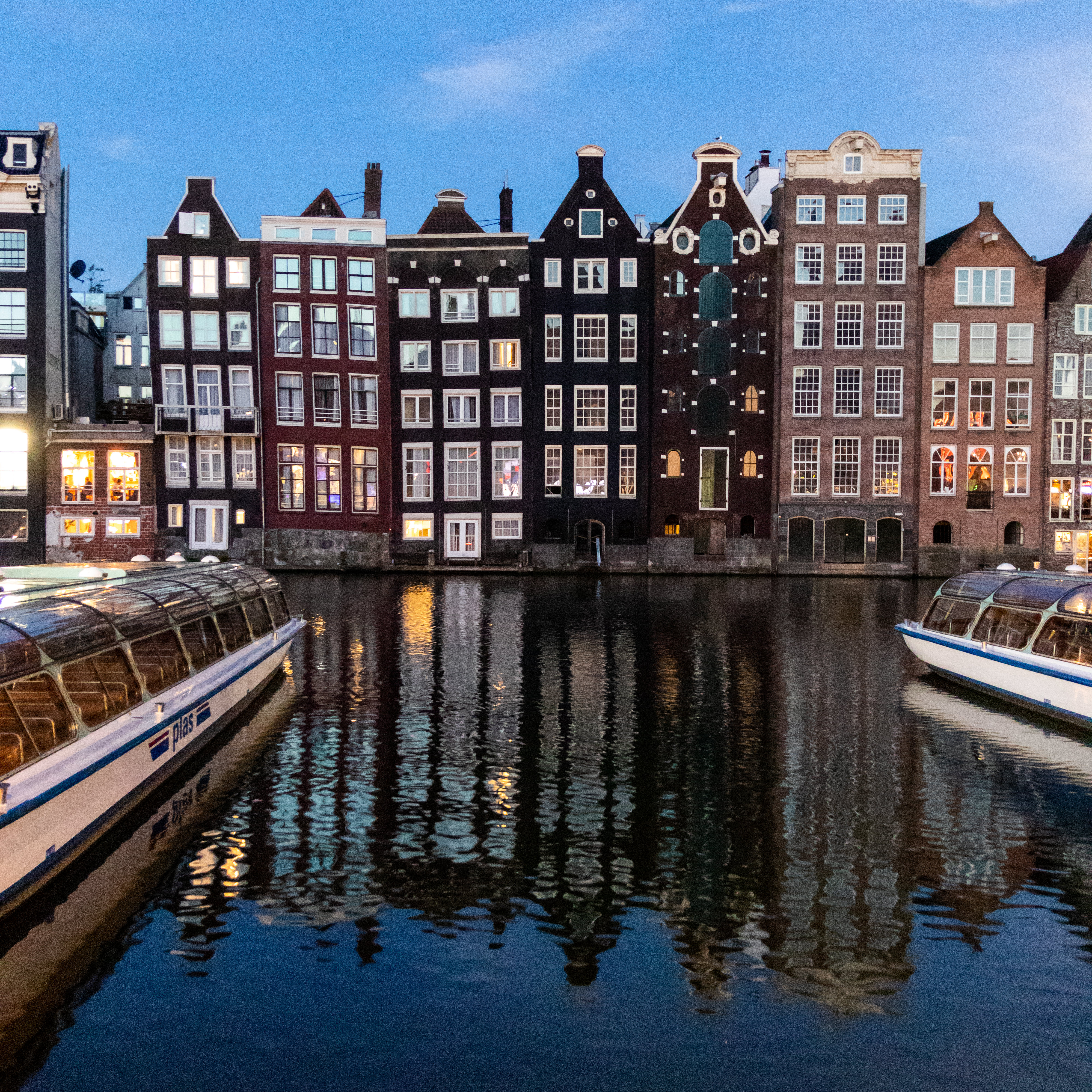 Amsterdam June 2018